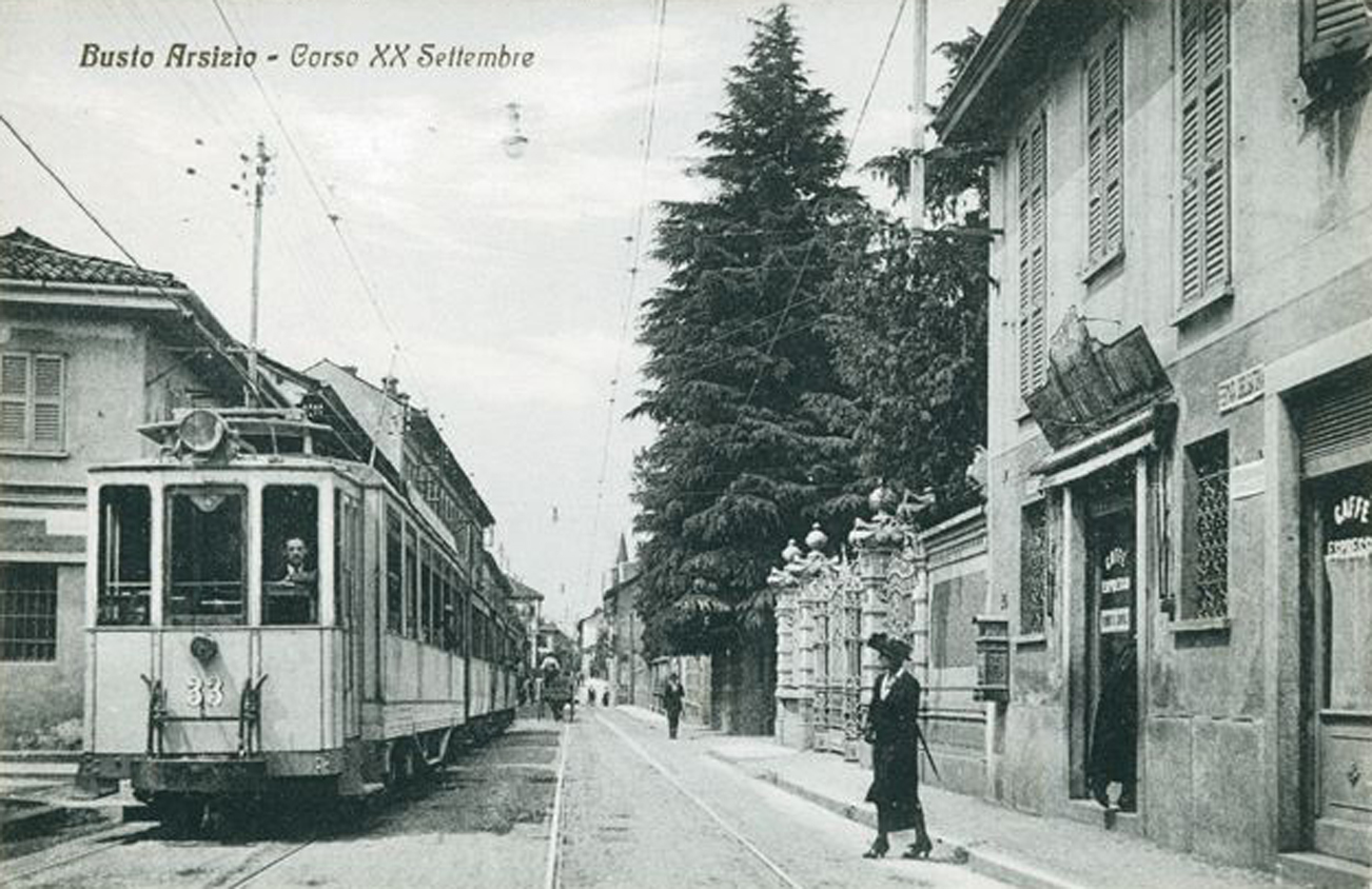 Un tram in via 20 settembre a Busto Arsizio in una foto d'epoca